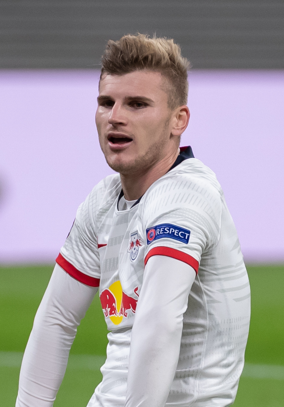 Fußball, Männer, UEFA Champions League, RB Leipzig - Olympique Lyonnais; Timo Werner (RB Leipzig, 11) kann sein Versagen nicht fassen, nachdem er völlig frei stehend über das Tor schoss; Enttäuschung, enttäuscht, Frustration, disappointed